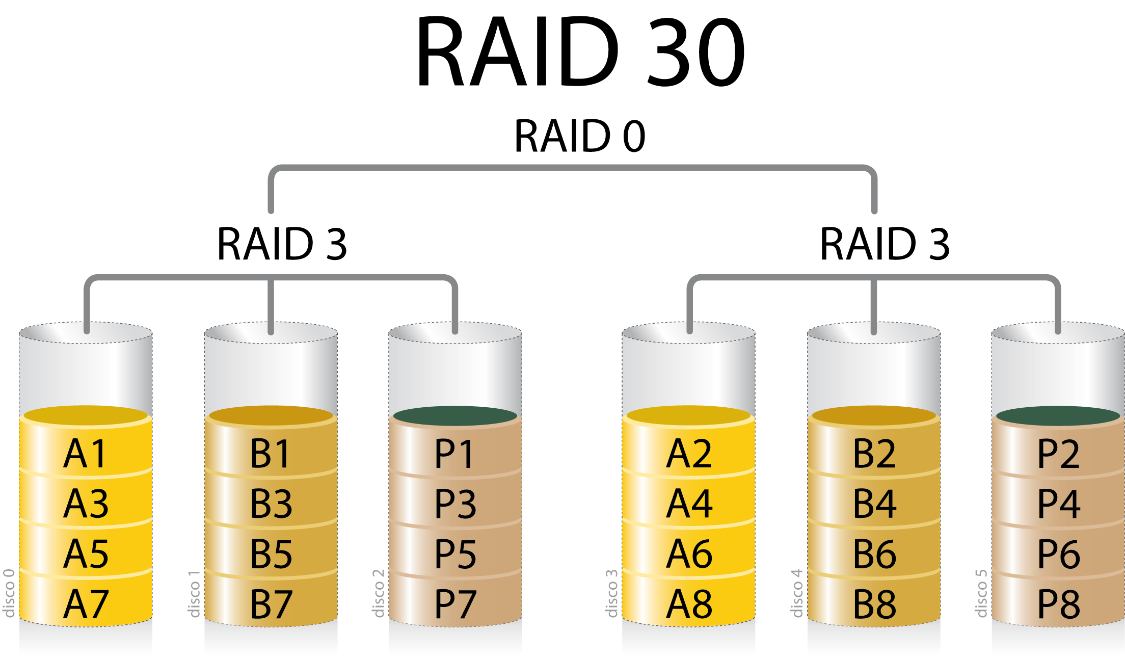 Esquema RAID 30